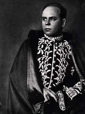 L'architetto Marcello Piacentini nel 1937, dalla rivista "Capitolium" 1933, p. 607, presentato come architetto princeps della nuova Università degli studi di Roma.